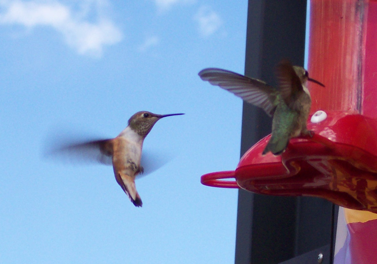 Breitschwanzkolibris (Selasphorus platycercus) an einer Tränke in Utah